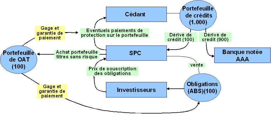 Description: Schéma d'une titrisation synthétique partiellement financée Source: Bradypus Licence: Bradypus